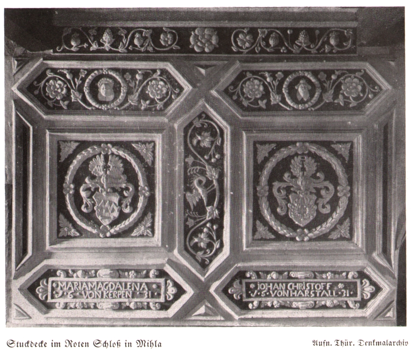 Stuckdecke im Festsaal des Roten Schlosses, Mihla, aus der Mitte des 17. Jahrhundert.